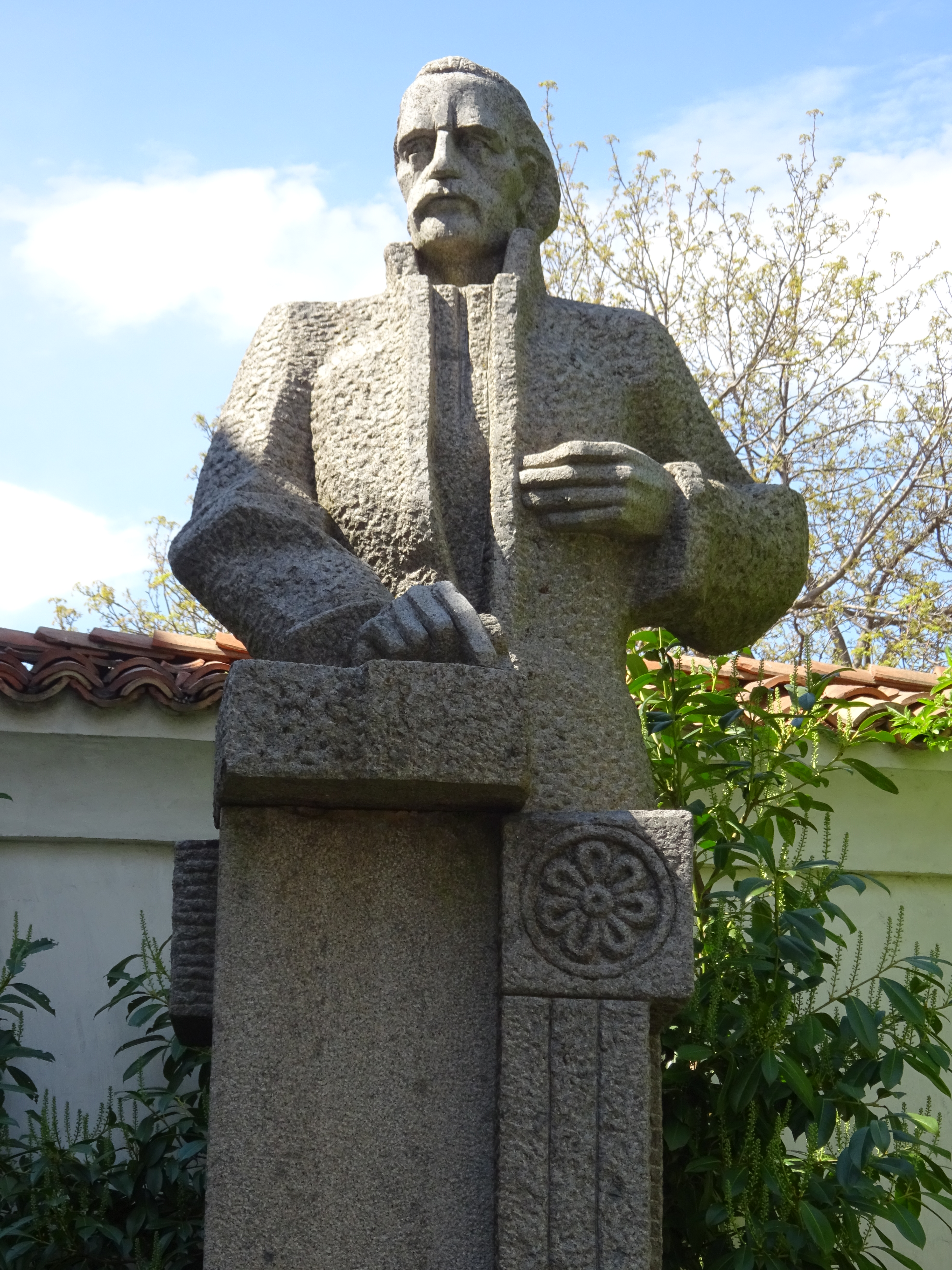 Даскал Ботьо Петков, Калофер